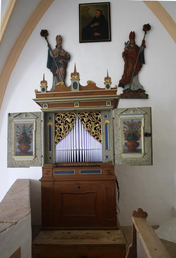 Orgel in Torren